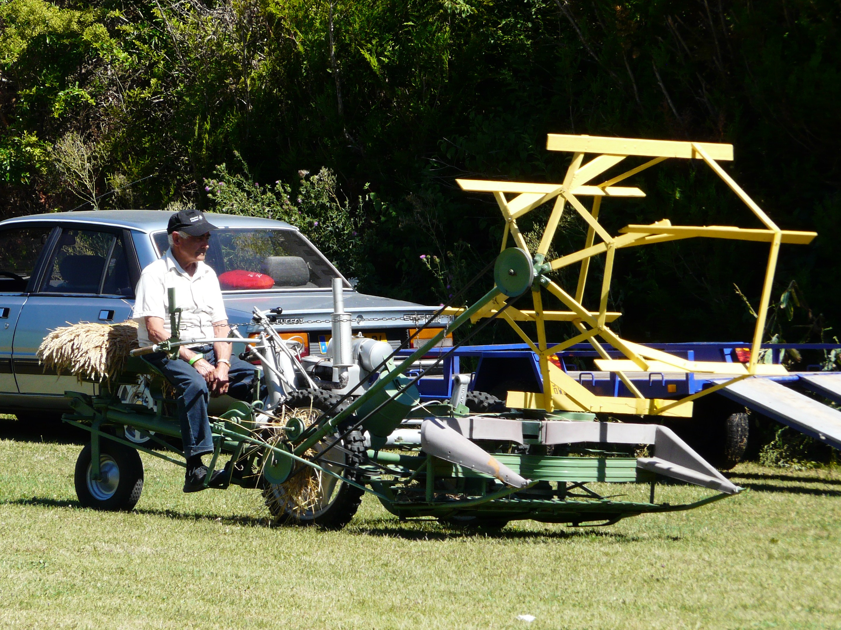 Moto faucheuse lieuse en démonstration, fête des battages 2016 à Saint-Cybranet, Dordogne, France.